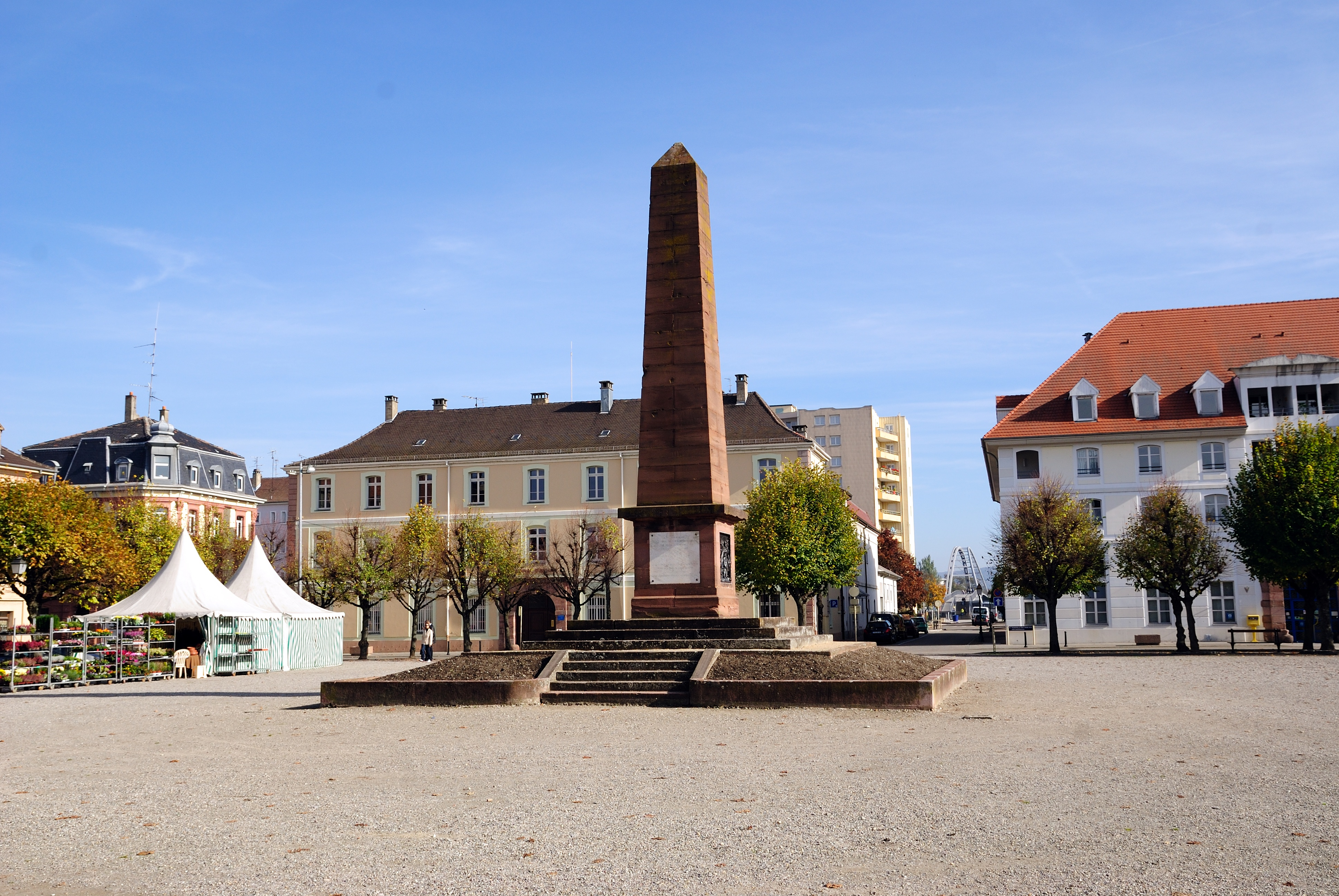 Huningue: Place Abbatucci, rechts im Hintergrund die Dreiländerbrücke This building is indexed in the Base Mérimée, a database of architectural heritage maintained by the French Ministry of Culture, under the references PA00085461 and IA00024507 .